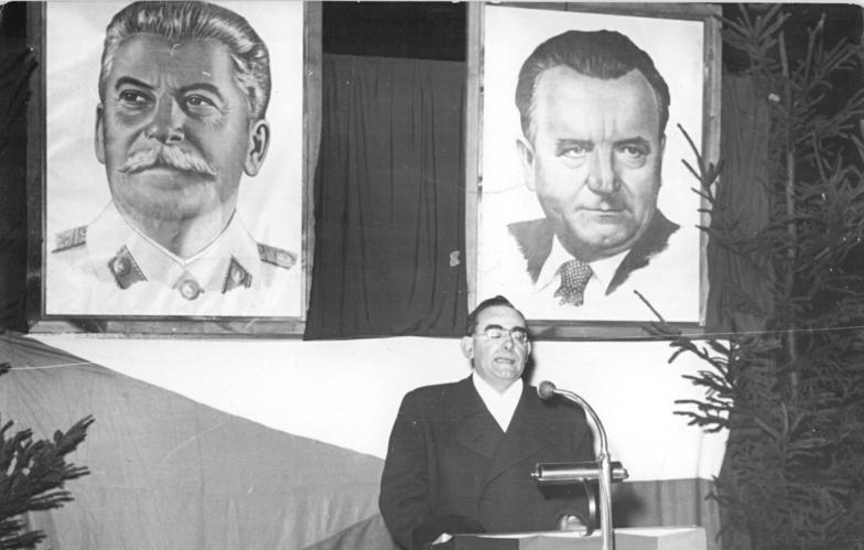 Illus-Sturm 21.12.50 Schnelltriebwagen Berlin-Praha Zu Ehren des 71. Geburtstages von Generalissimus Stalin wurde am 21.12.50 die Schnelltriebwagenverbindugn Berlin-Praha aufgenommen. Die Fahrtdauer beträgt 6 Stunden 10 Minuten. In einer Feierstunde übergab Minister Reingruber den FDT 54 auf dem Bahnhof Friedrichstrasse seiner Bestimmung. UBz: Der tschechoslowakische Botschaftsrat Fürnberg bei seiner Ansprache.